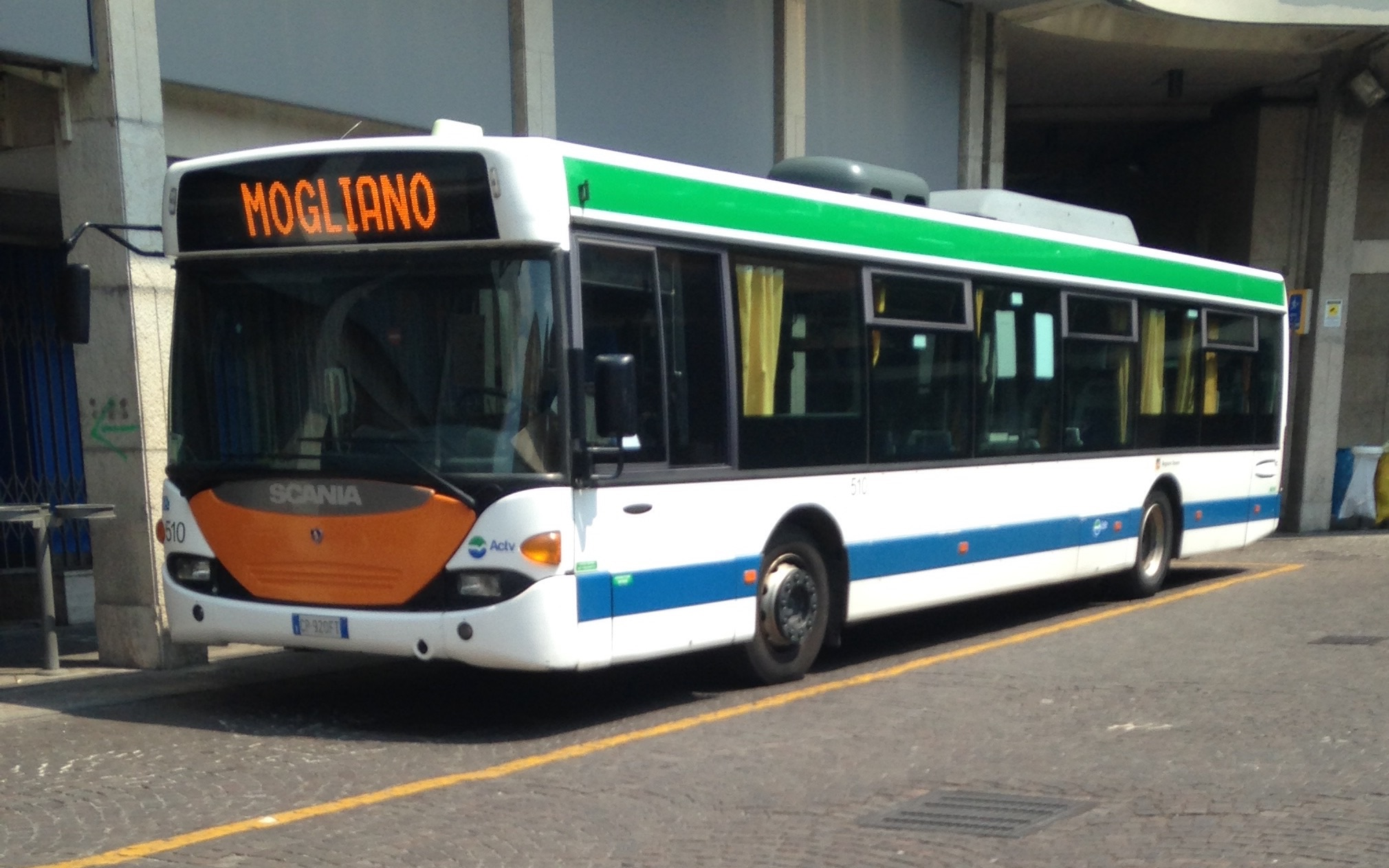 Autobus 510 Scania OmniCity di ACTV Venezia, presso l'Autostazione delle Corriere di Treviso, in servizio extraurbano sulla Linea 8E, limitata Mogliano Veneto.